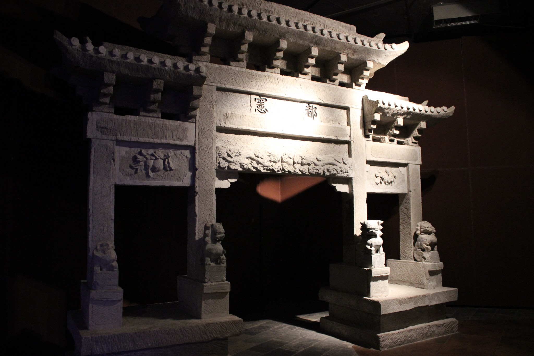 莱芜西关街牌坊仿品，在莱芜战役纪念馆